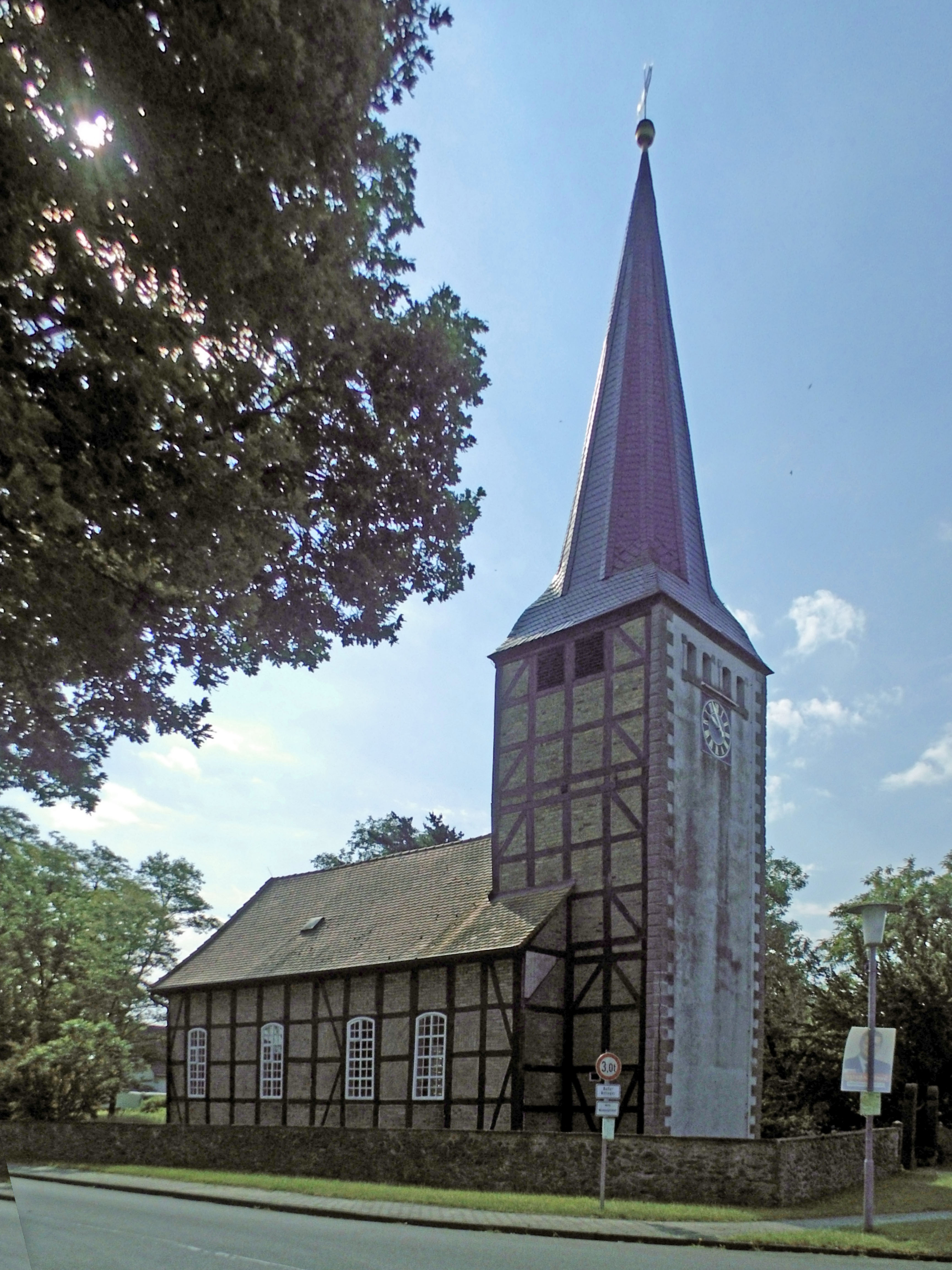 Evangelisch-lutherische Kirche in Dannefeld bei Gardelegen (Sachsen-Anhalt)